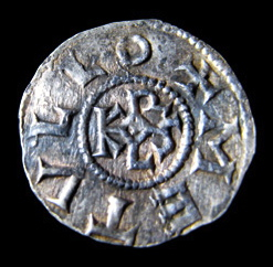 Denar aus dem Fundamentbereich des Aachener Domes (Rückseite), nach 794